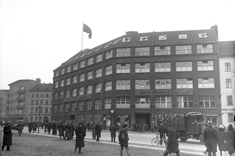 Das Karl Liebknecht-Haus am Bülowplatz auf Veranlassung des Reichsgerichts von der Polizei besetzt! Blick auf das Karl Liebknecht-Haus, in welchem die "Rote Fahne" untergebracht ist, während der Besetzung durch die Polizei. Es wurde wichtiges Aktenmaterial beschlagnahmt.